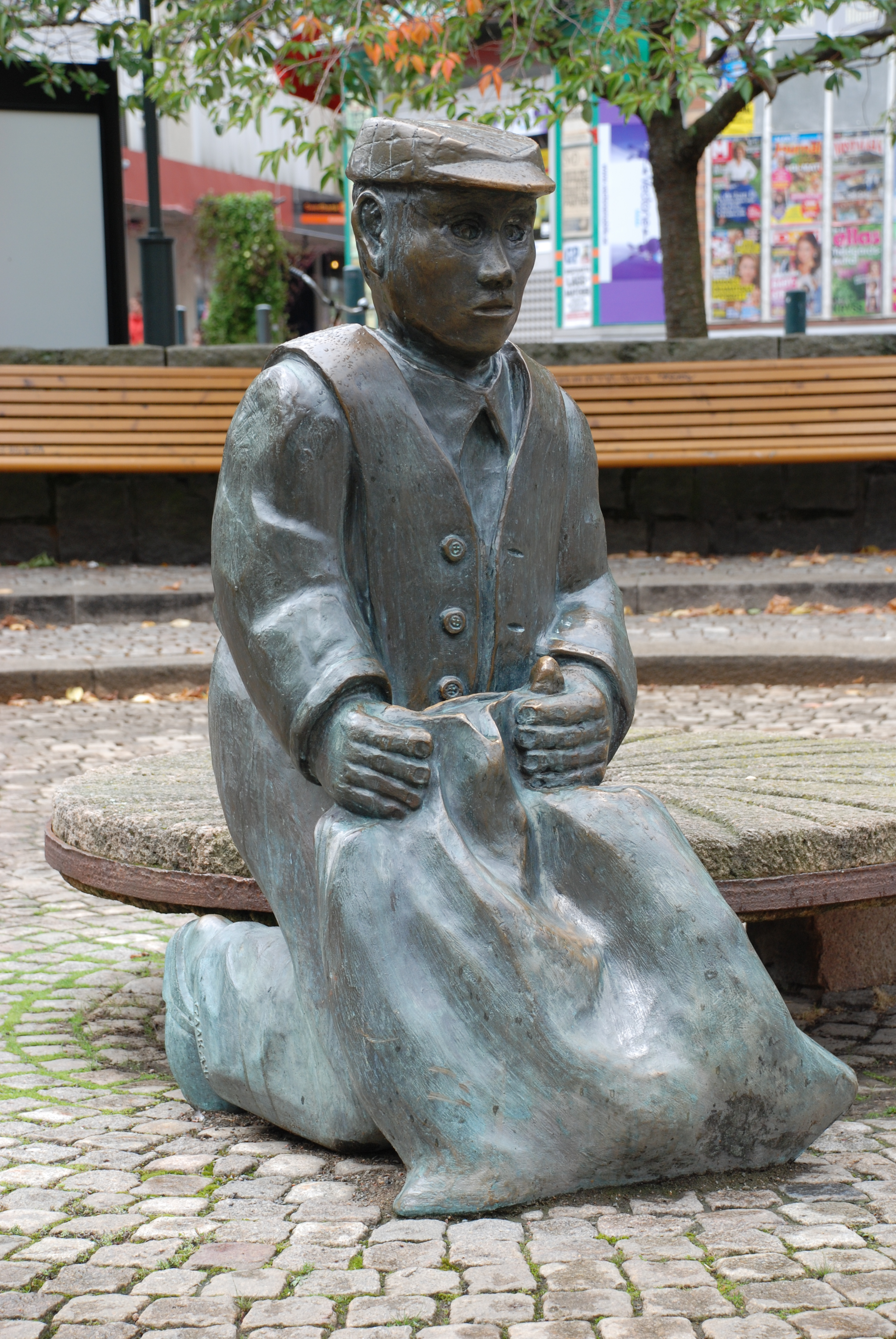 Skulpturen Albert av Lars Spaak på Alberts torg i Mölndals centrum. Invigd 9 november 1984.